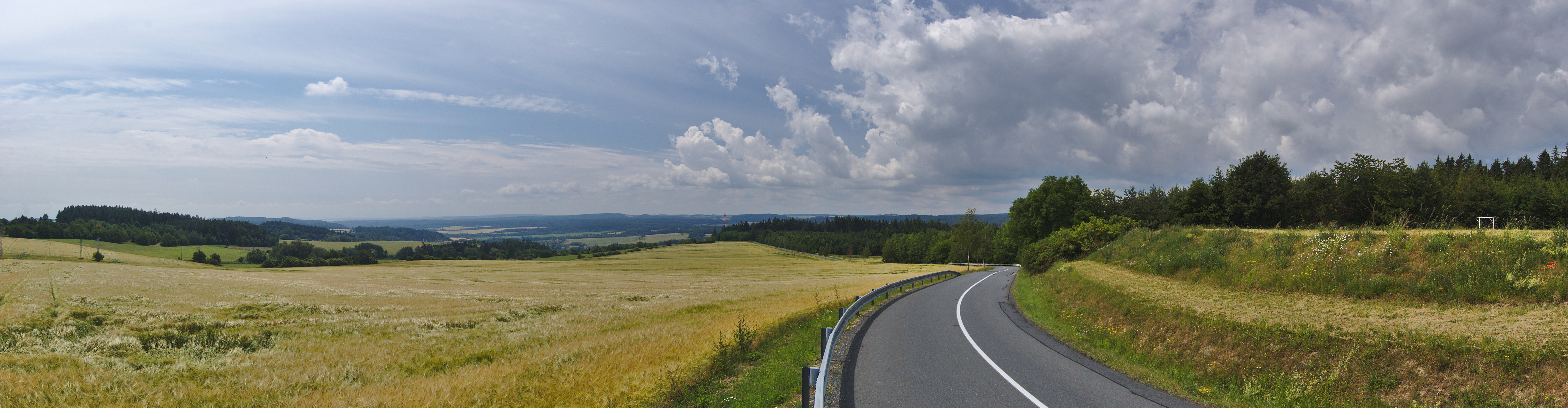 Výhled na Konici, Konicko a Drahanskou vrchovinu od březského hřiště, okres Prostějov